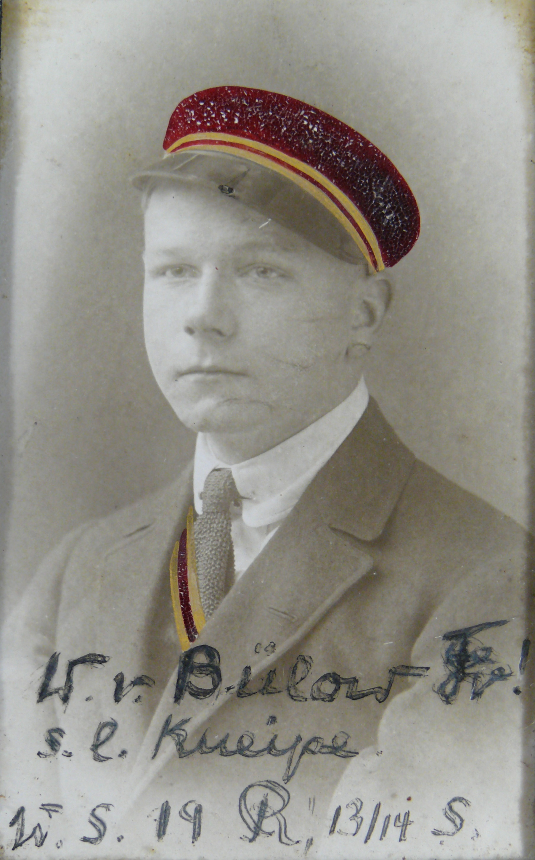 Porträtfotographie von Walter von Bülow-Bothkamp (1894-1918) als Heidelberger Vandale